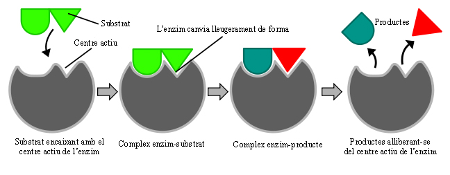 File:Induced fit diagram.svg traduït al català